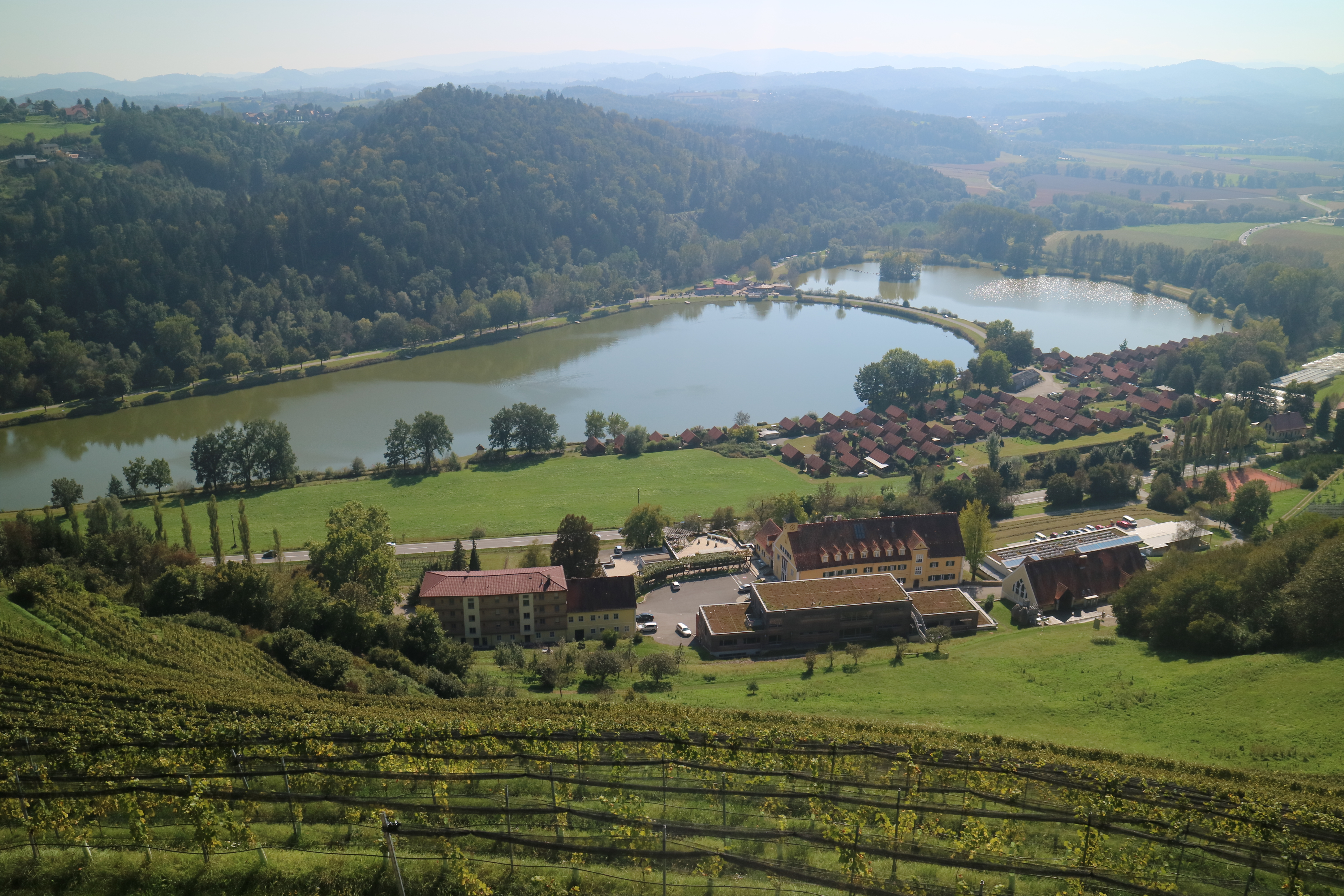 Blick von der Silberbergwarte auf den Sulmsee, Gemeinde Leibnitz (Südsteiermark)